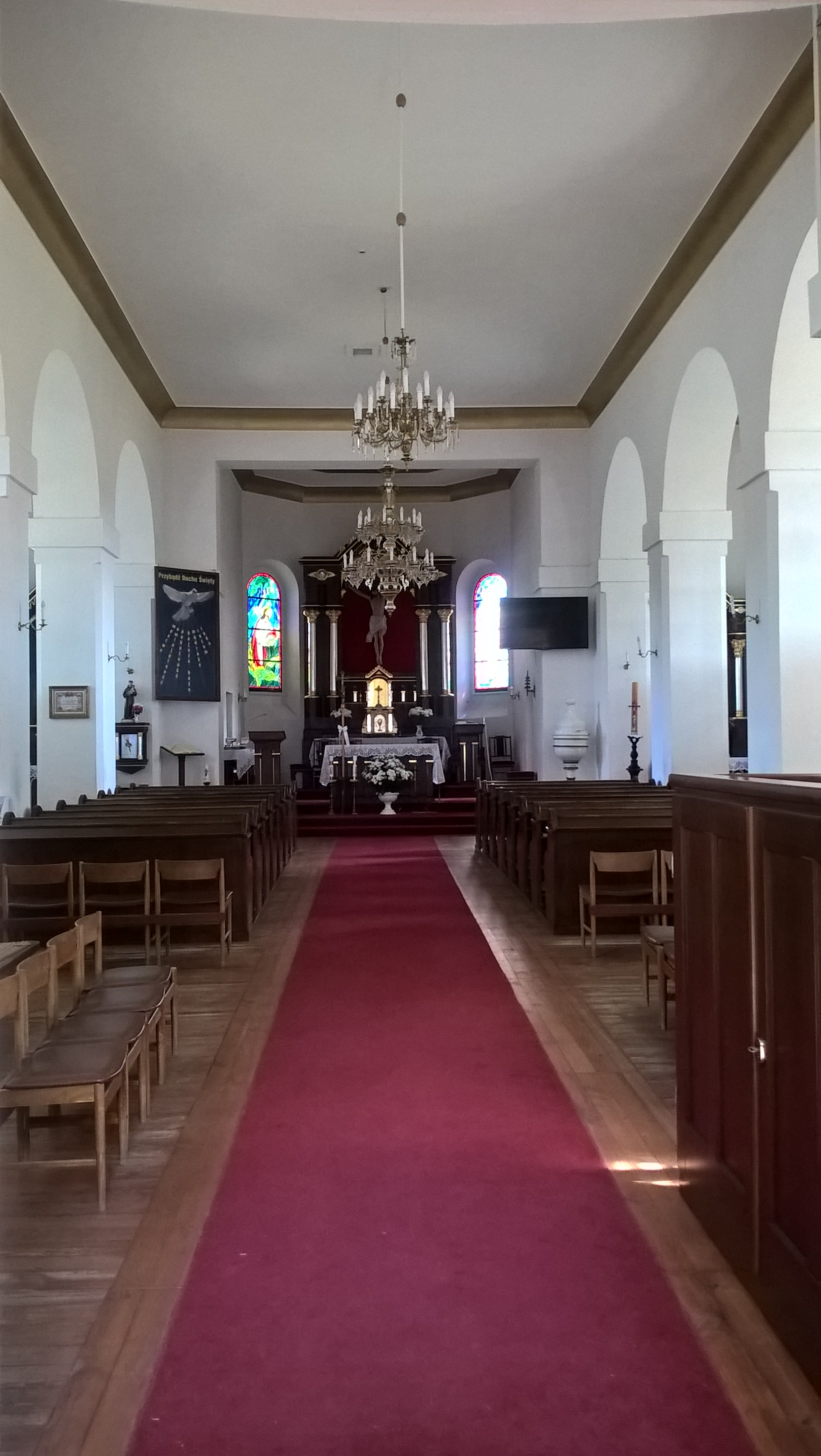 Nawa kościoła w Księzpolu